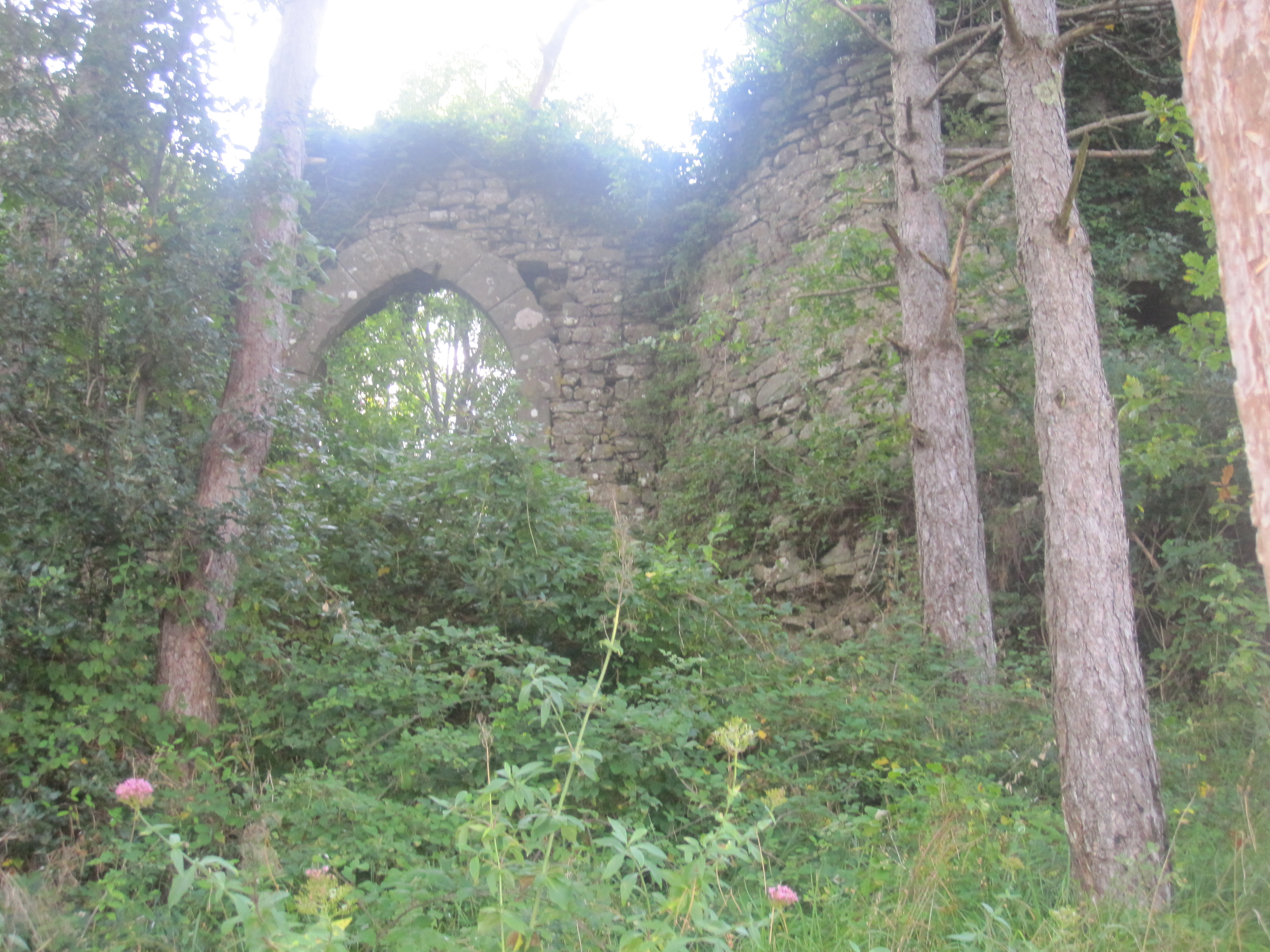 Opera propria, Matteo Tamburini